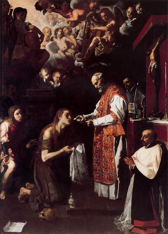 La obra representa a Santa María Magdalena recibiendo la Sagrada Comunión.